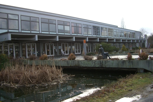 Rechts- und wirtschaftswissenschaftliche Fakultät